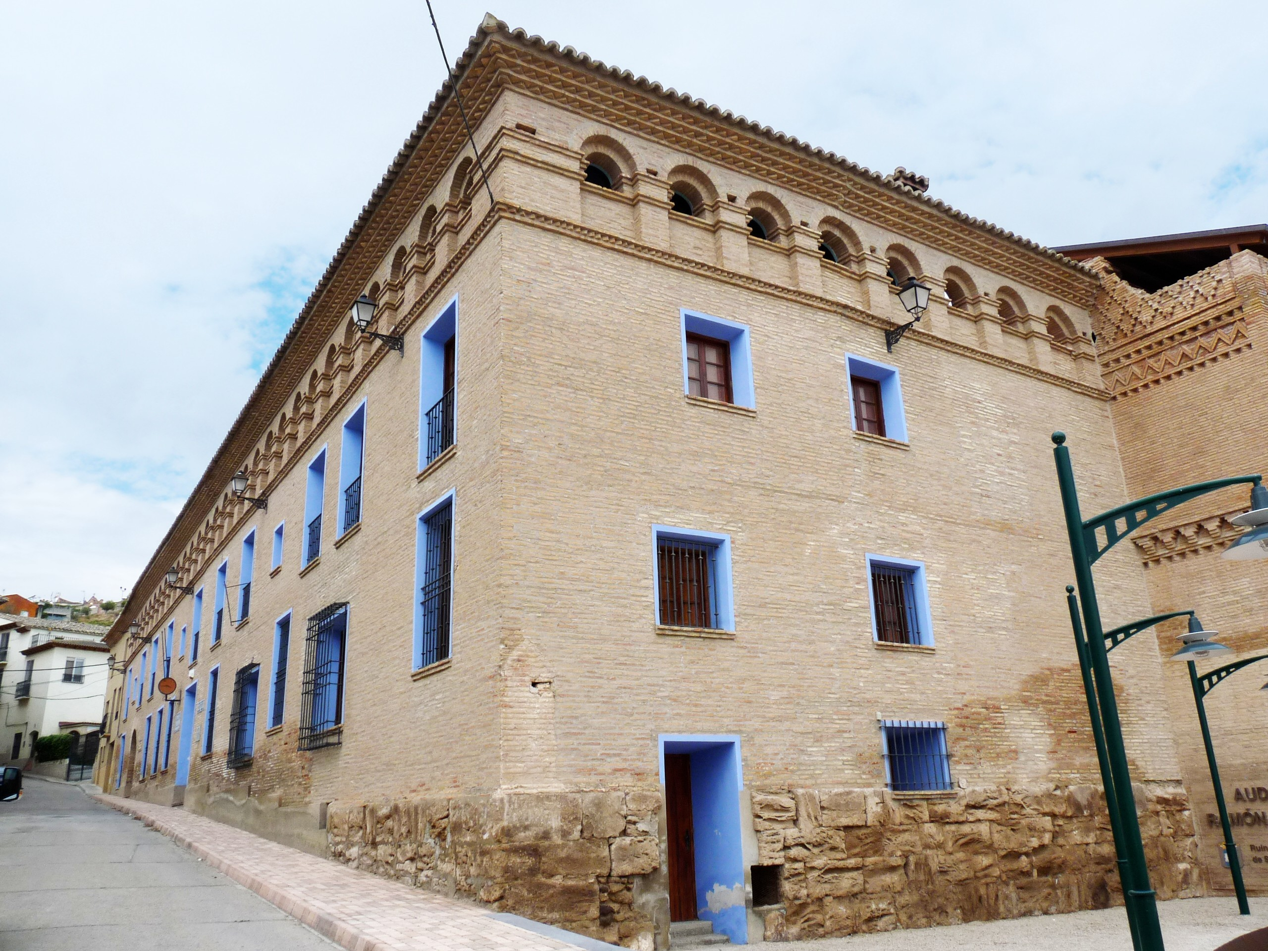 Magallón - Convento de Dominicos (1612)